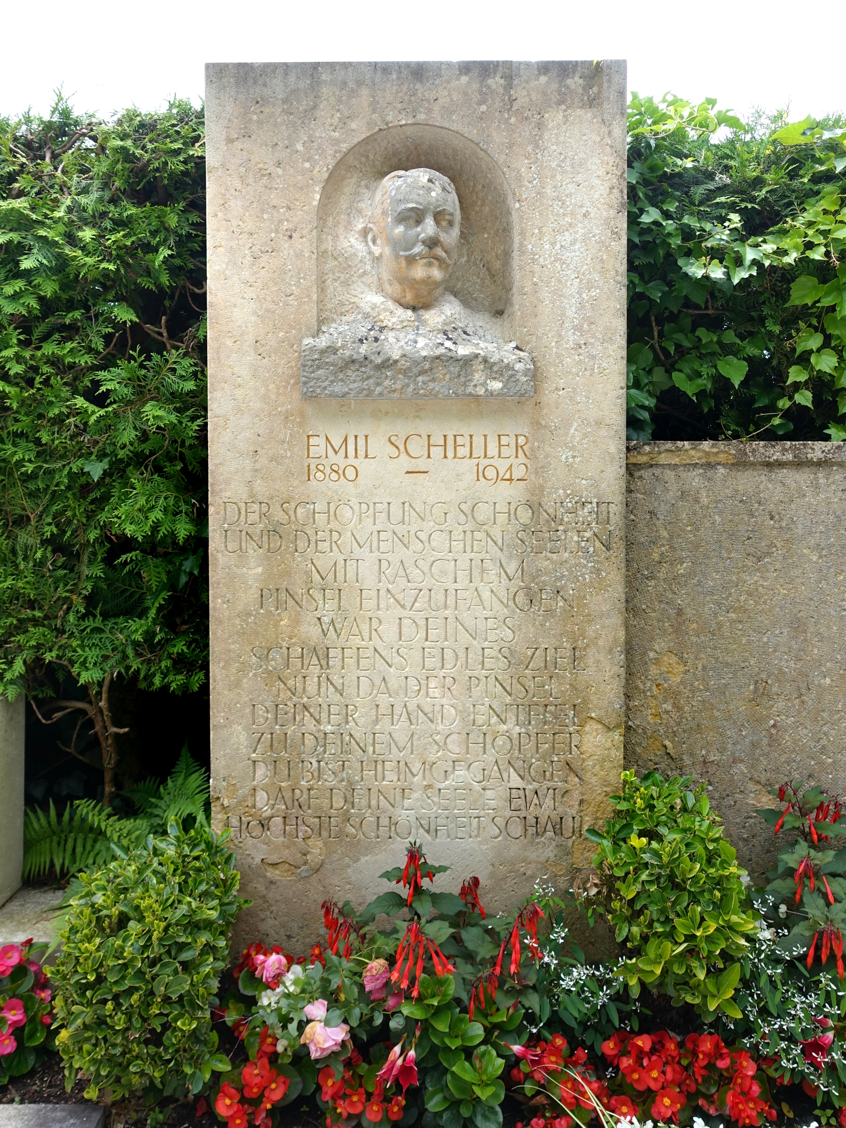 Katholische Kirche, Feldbrunnen-St.Niklaus. Grab von Emil Scheller (1880–1942) Maler, Zeichner